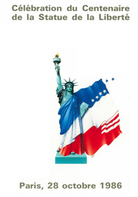 campagne anniversaire révolution